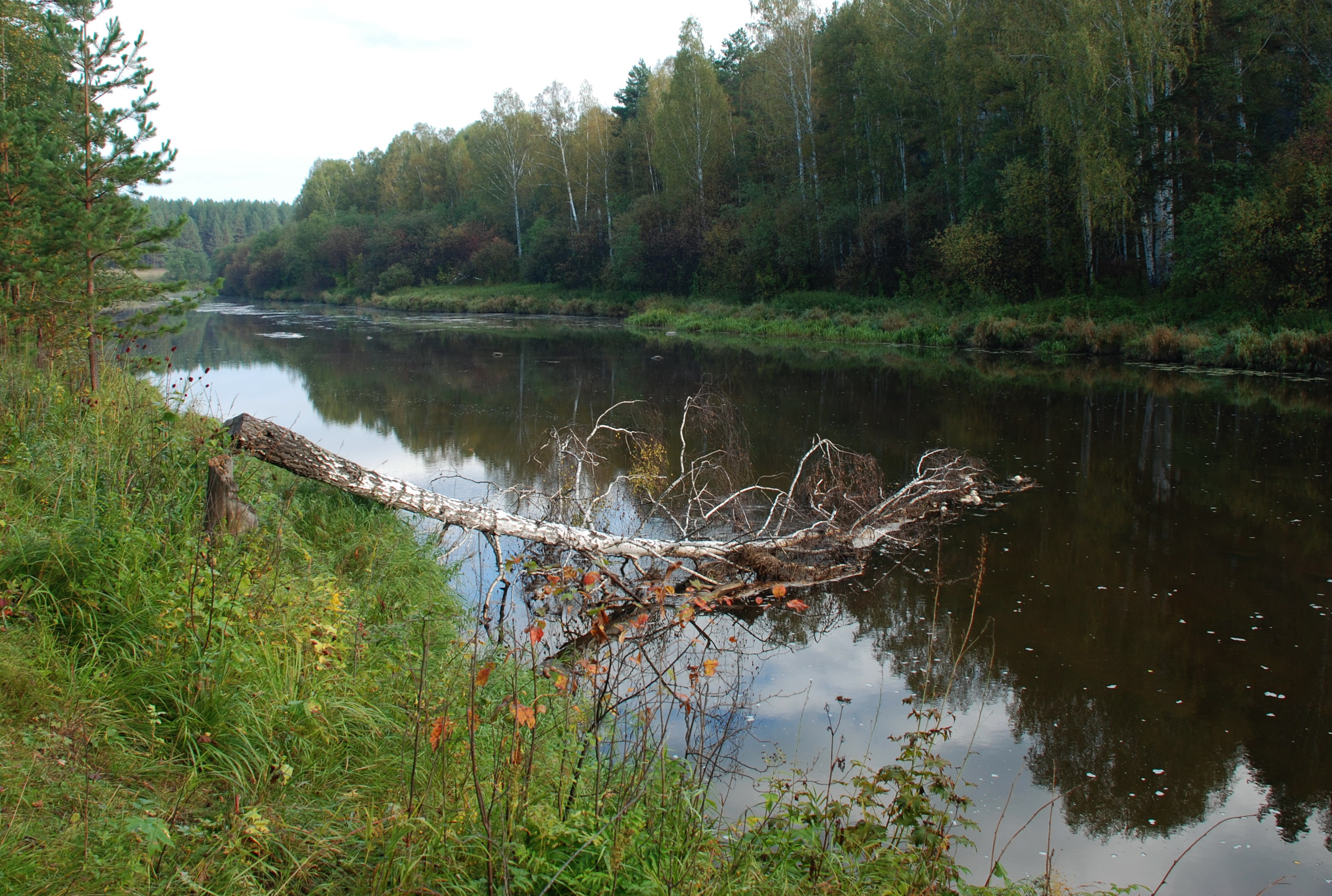 Река Реж. Свердловская область.